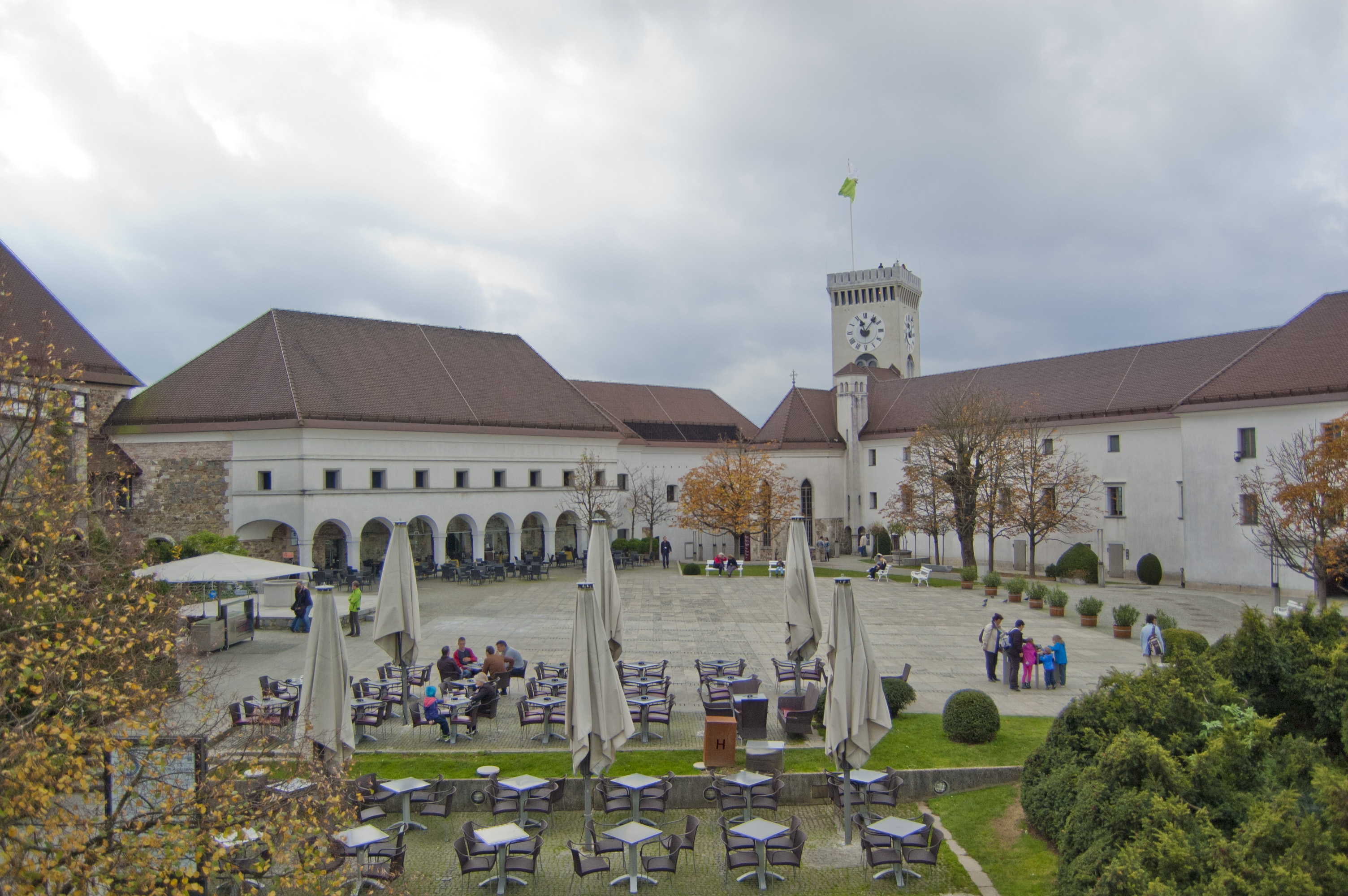 @ Ljubljana, Slovenia